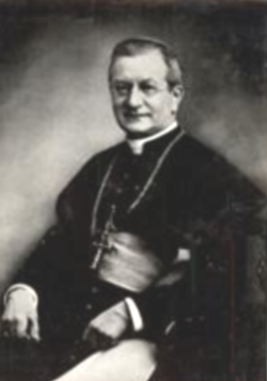 Jacobus von Hauck (1861-1943) Erzbischof von Bamberg von 1912 bis 1943, Administrator des Bischofs von Würzburg 1920-1924